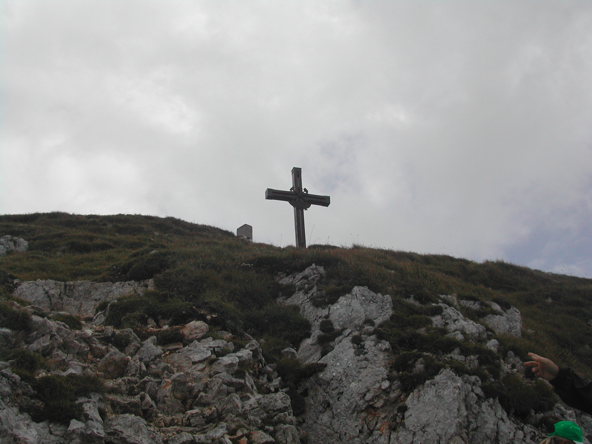 Gifpelkreuz am Dobratsch